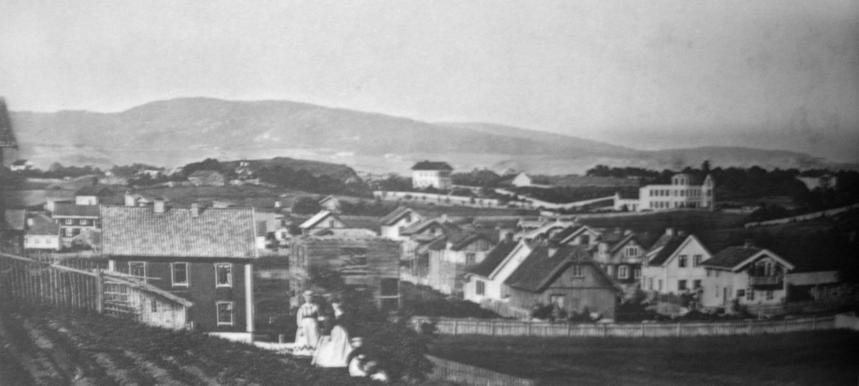 Balkeby i Oslo på 1860-70-tallet